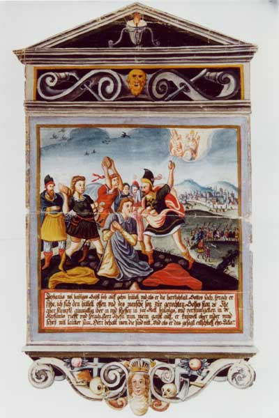 Das Kienlin-Epitaph aus der Jakobuskirche zur Erinnerung an Stephan Kienlin und seine Ehefrau Elisabeth Hirsch († 1585) wurde um 1870 bei Renovierungsarbeiten aus der Kirche entfernt und ist seitdem verschollen. Dies ist Abbildung einer Kopie auf Büttenpapier. (Maße: Original: ca. 2 × 1,25 m, Kopie:36 × 22 cm.) Zwischen zwei Schmuckleisten befand sich eine quadratische Bildtafel, die das Martyrium des Heiligen Stephanus darstellte. Dieser wurde wegen Gotteslästerung verleumdet und gesteinigt.